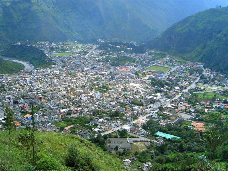 Baños as seen from Mirador de la Virgen. Nearby vulcano Tungurahua in Ecuador.